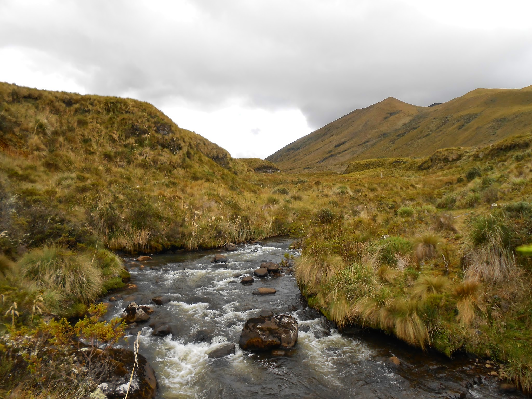 Vertiente en los páramos del llanganates